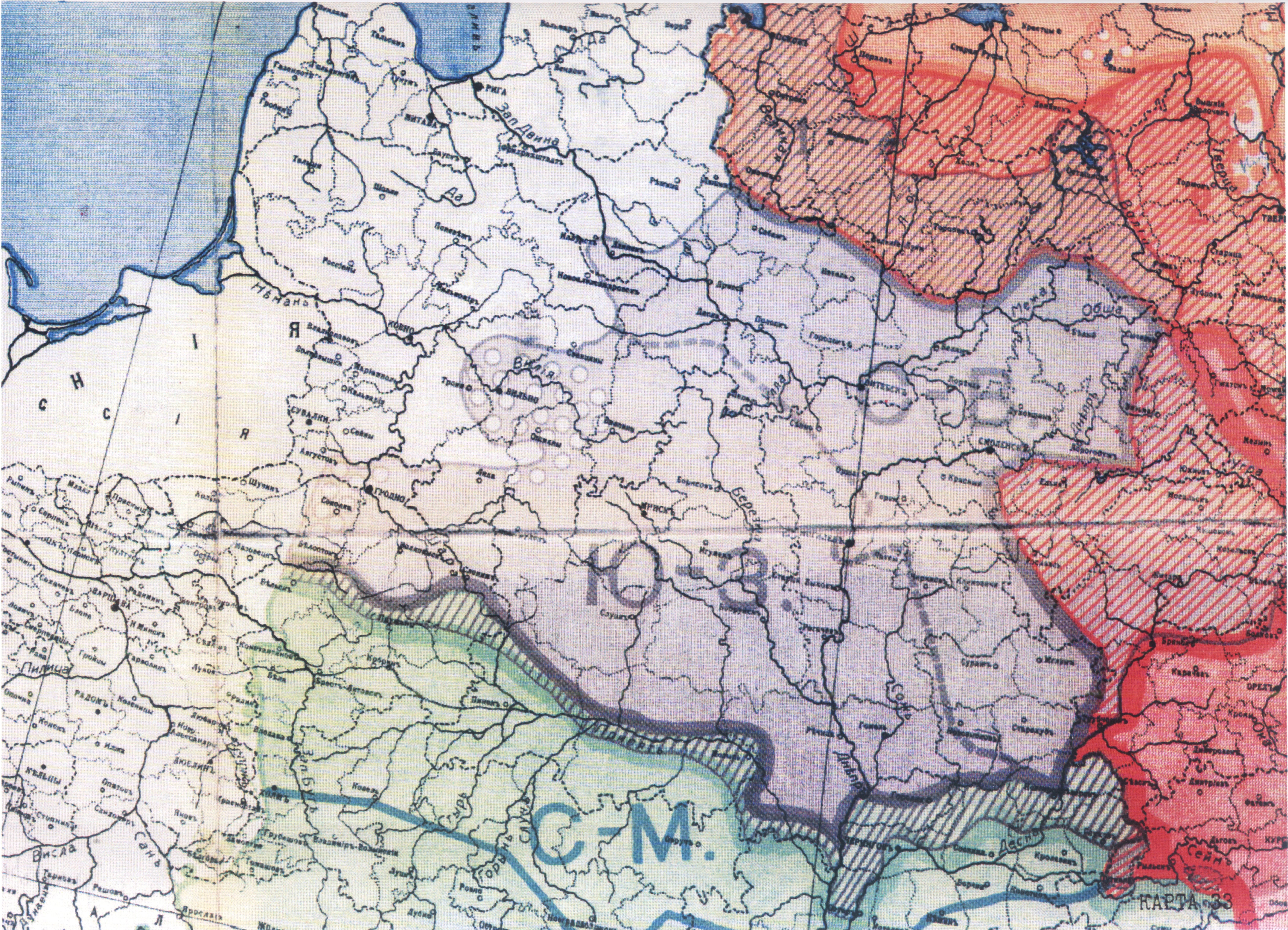 Mapa występowania języka białoruskiego jako dialektu języka rosyjskiego, 1914